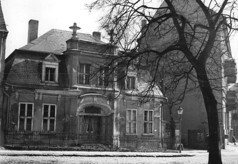 Frankfurt/Oder, Orgelbauanstalt Zentralbild Klein 27.3.52 Orgelbauanstalt Sauer in Frankfurt-Oder In Frankfurt-Oder wurde die Orgelbauanstalt W. Sauer gegründet. Viele Jahre mühevoller Arbeit sind seitdem vergangen. Große Erfolge wechselten mit Zeiten schwerster wirtschaftlichen Nöten. Doch der Betrieb blieb seinem Grundsatz treu, stets das Beste in vollendeter Form herzustellen. Heute ist die Orgelbauanstalt weit über die Grenzen Europas bekannt. Die durch sen zweiten Weltkrieg zerstörten Kirchen stellen den Betrieb derzeit vor große Aufgaben im Orgelbau. UBz: Hinter diesem altertümlichen Haus in Frankfurt-Oder, in dem sich die Büroräume der Orgelbauanstalt befinden, liegen die Produktionsräume.